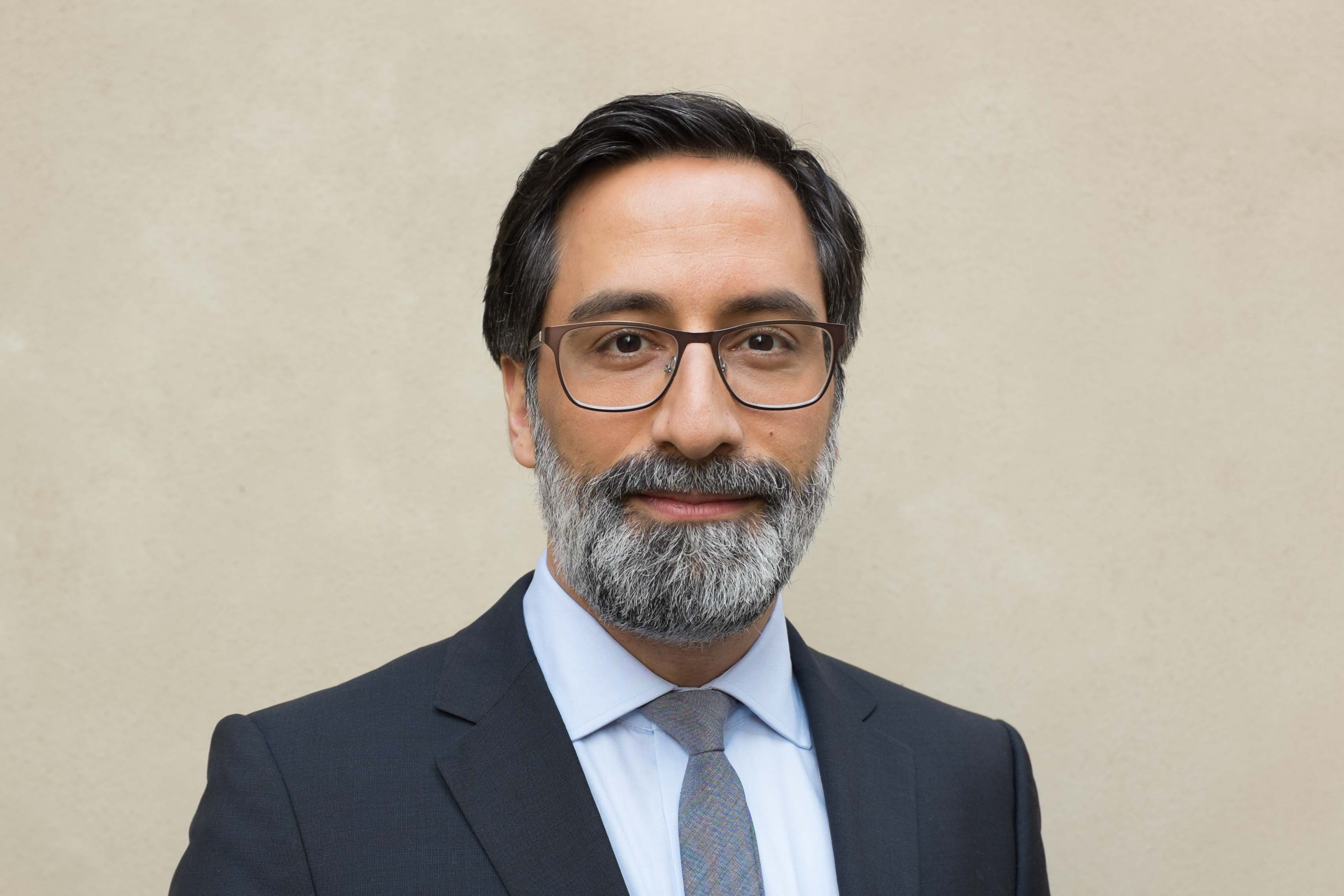 Intelectual, académico, publicista, columnista, emprendedor.